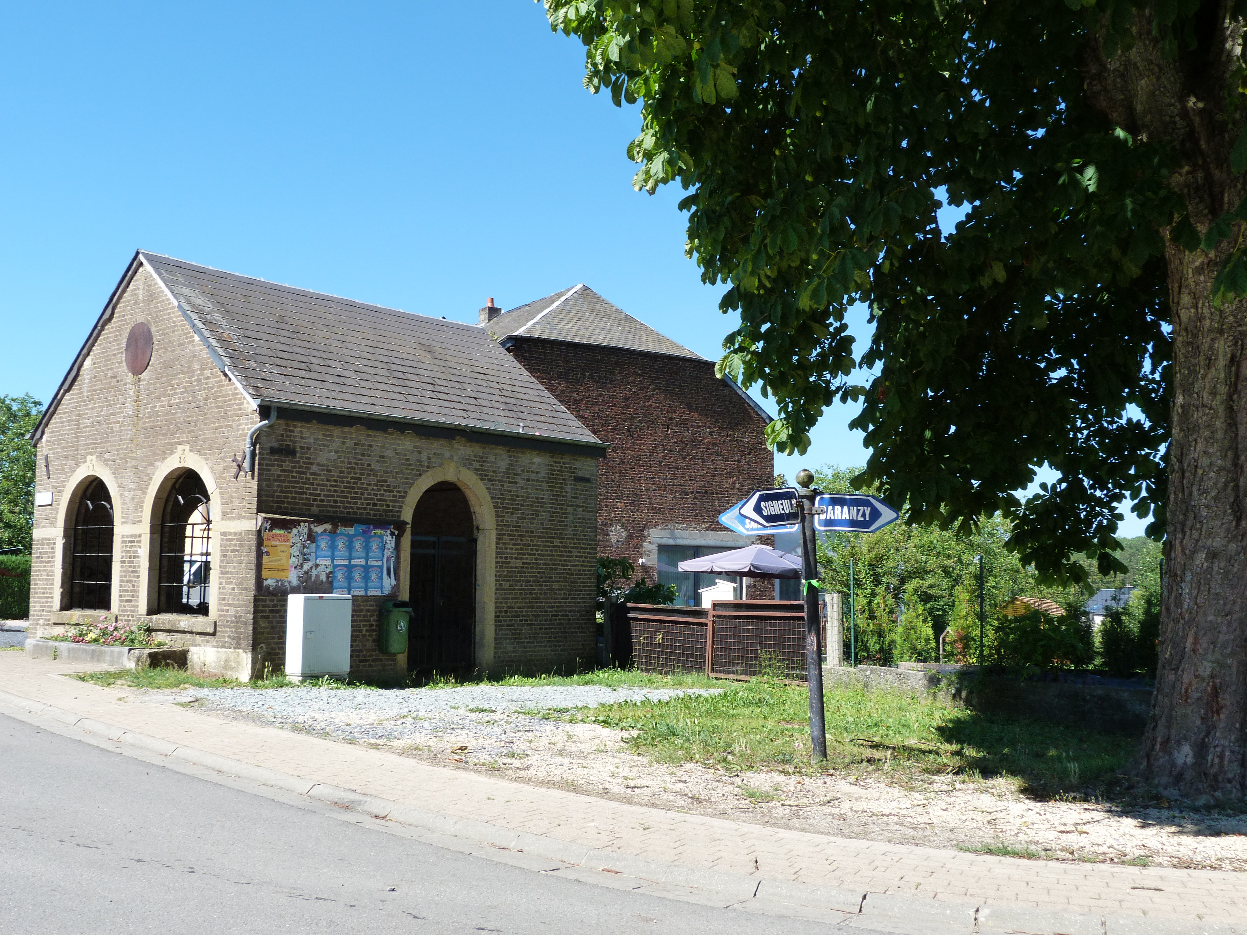 Le lavoir et les vieux panneaux routiers de Mussy en août 2013.